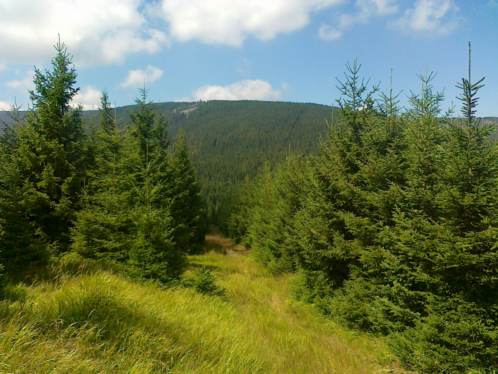 Widok na stok góry Vysoká Hole - 1465 m (kamienne morze -Suť) oraz ścieżkę zejścia ze szczytu góry Hradečná - 1057 m